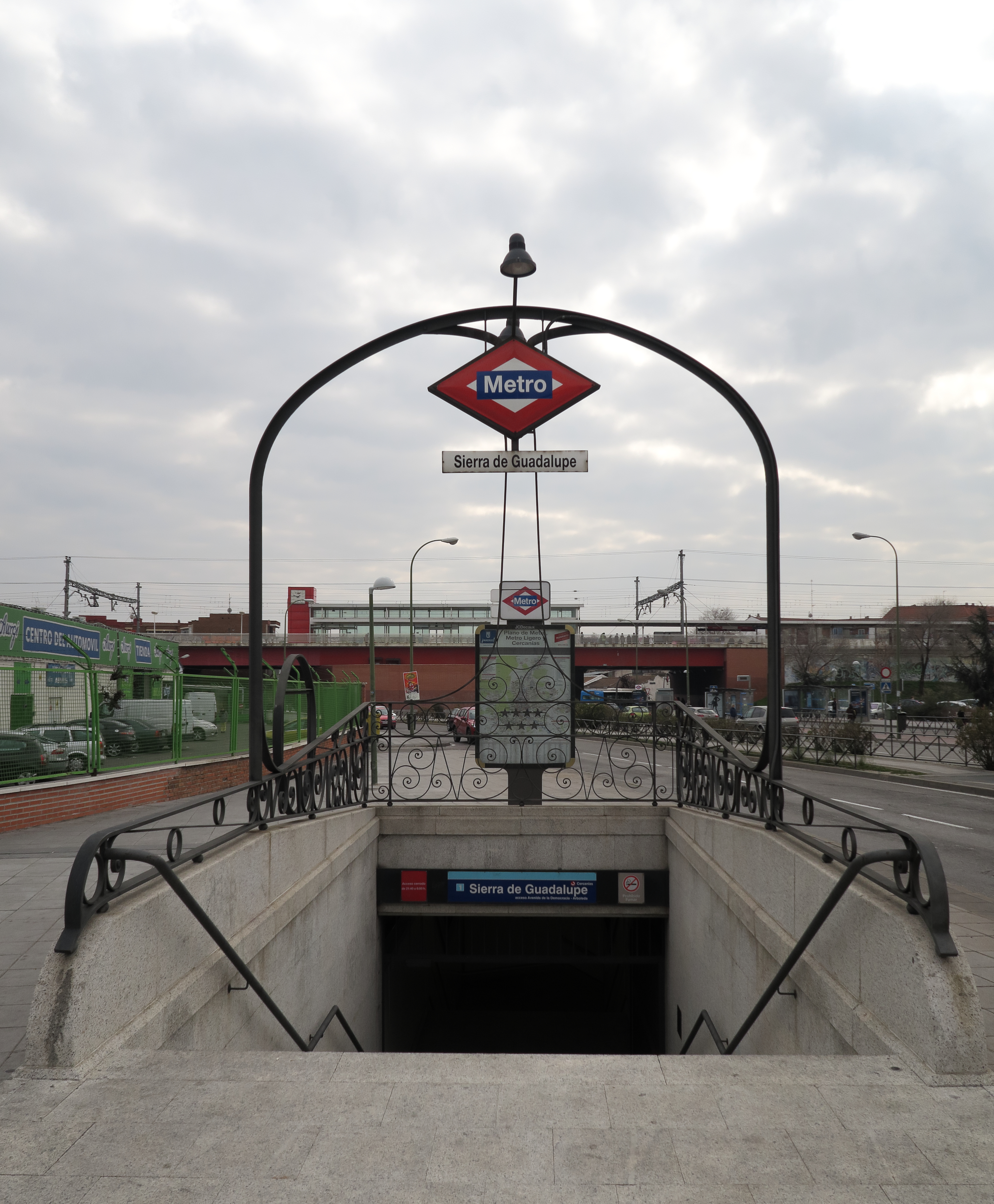 Estación de Sierra de Guadalupe